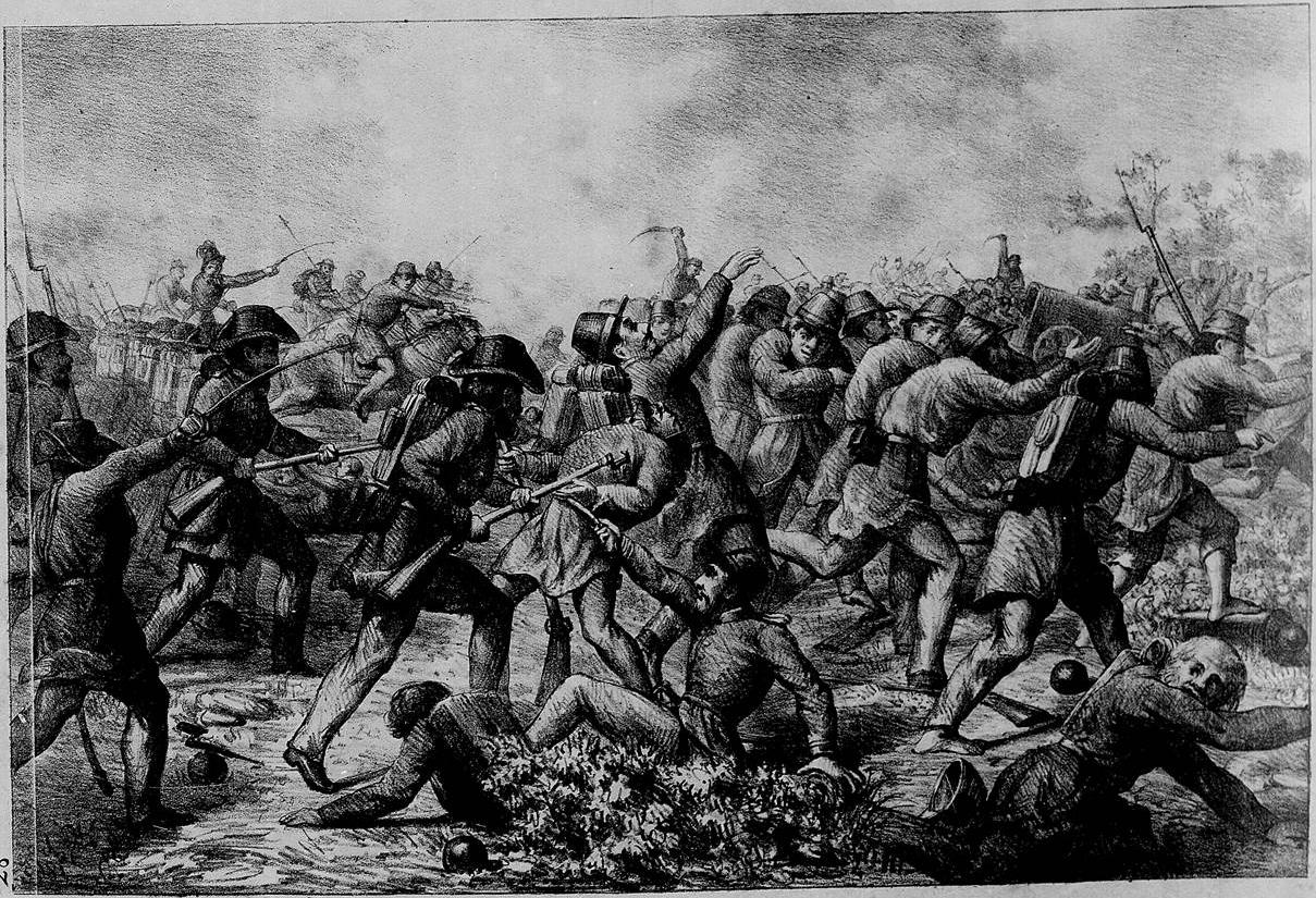 Derrota dos paraguaios em Yatahy.